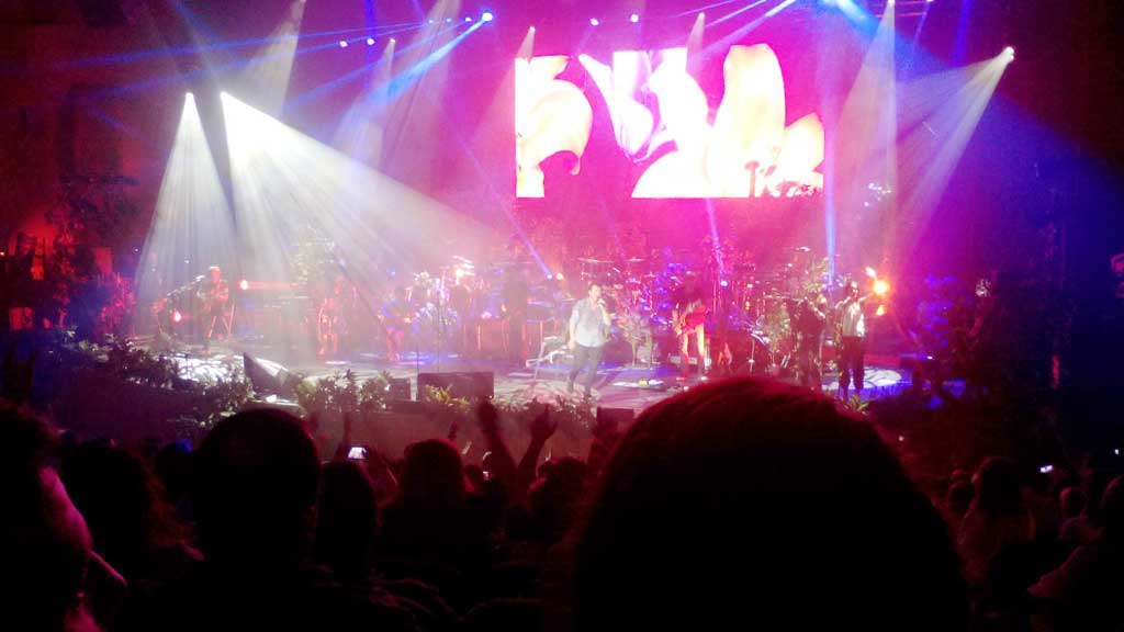 Manolo García na Coruña en 2016.